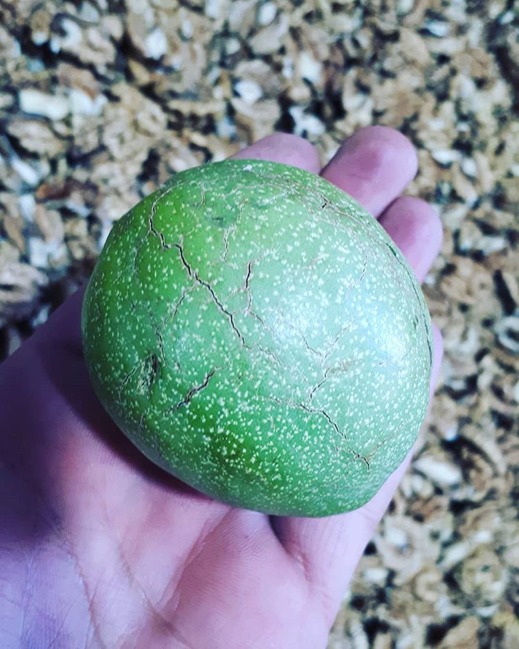 گردو سال 97 تویسرکان